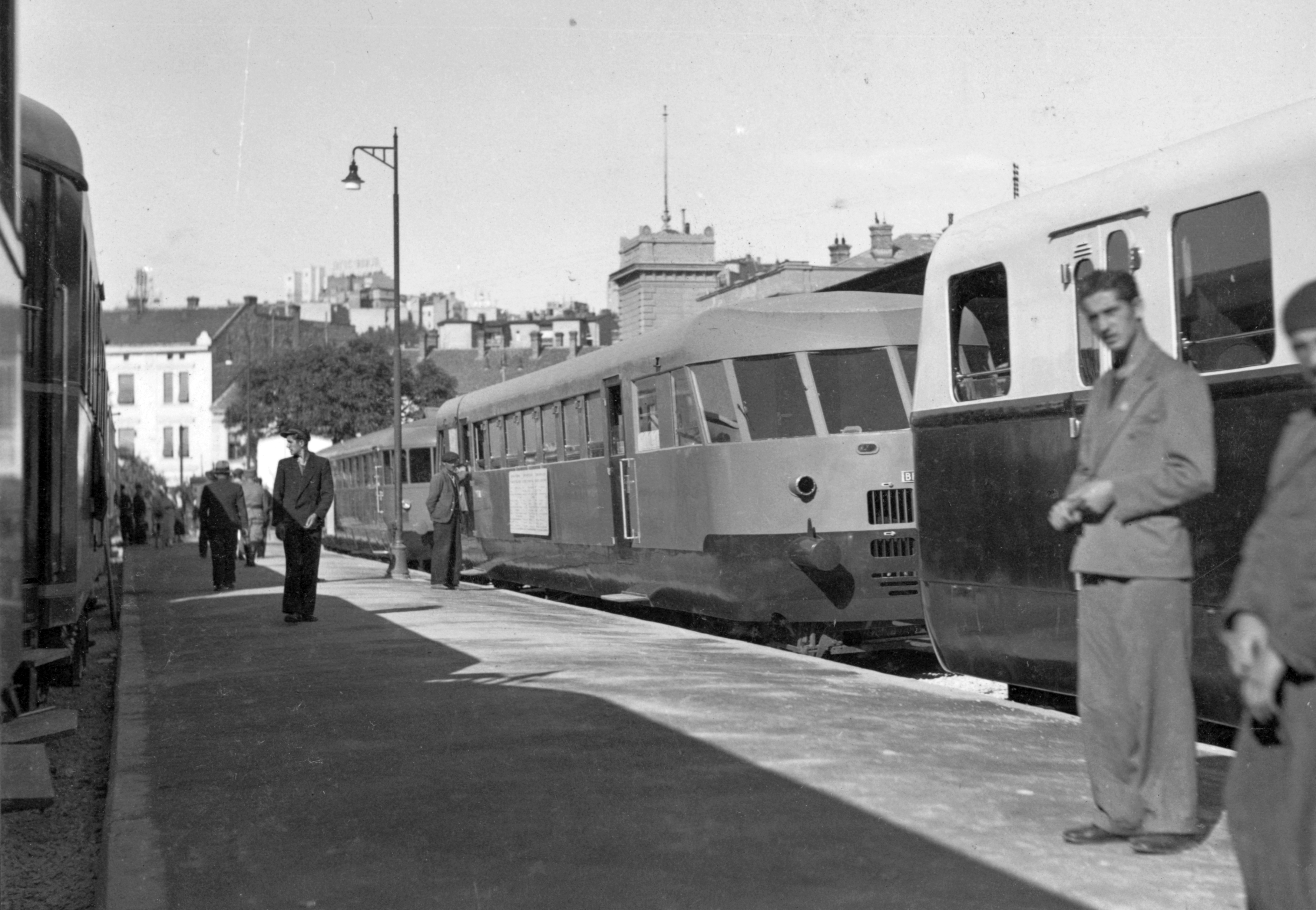 pályaudvar, Ganz gyártmányú Árpád sorozatú (TAS) sínautóbusz, mögötte egy milánói ALn Breda motorvonat. Location: Serbia, Belgrade Tags: railway, rail, Hungarian brand, Ganz-brand, Italian brand, Breda-brand Title: pályaudvar, Ganz gyártmányú Árpád sorozatú (TAS) sínautóbusz, mögötte egy milánói ALn Breda motorvonat.